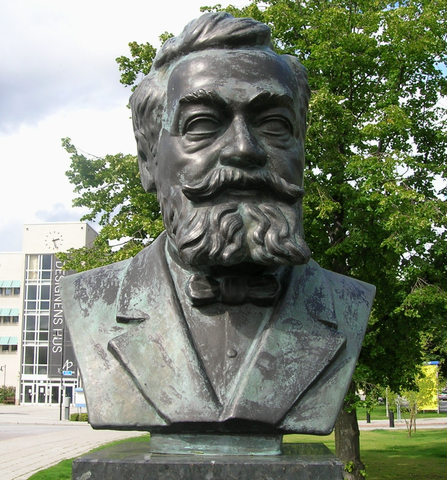 Byst av Lars Magnus Ericsson, konstnär Aron Sandberg. Står på Telefonplan, Midsommarkransen, Stockholm